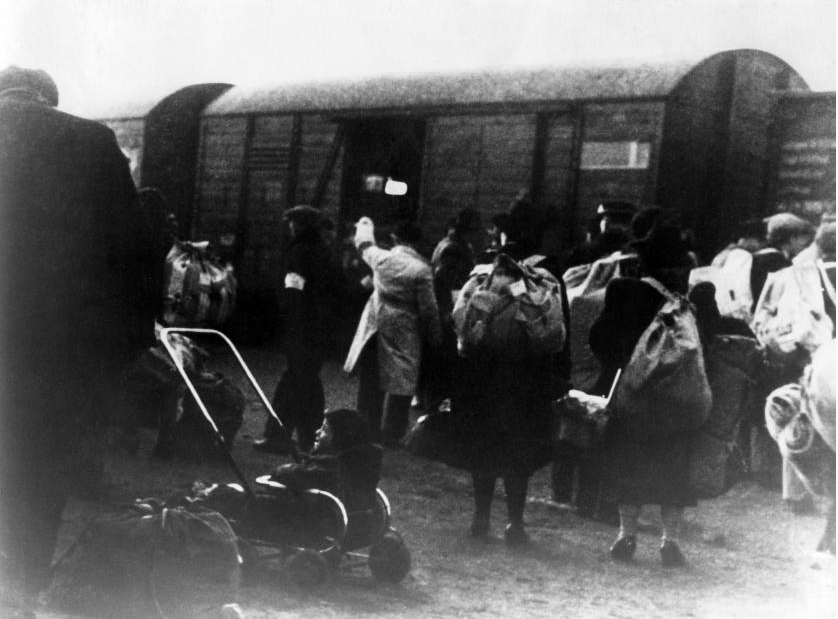 Deportatie van Joden te Westerbork